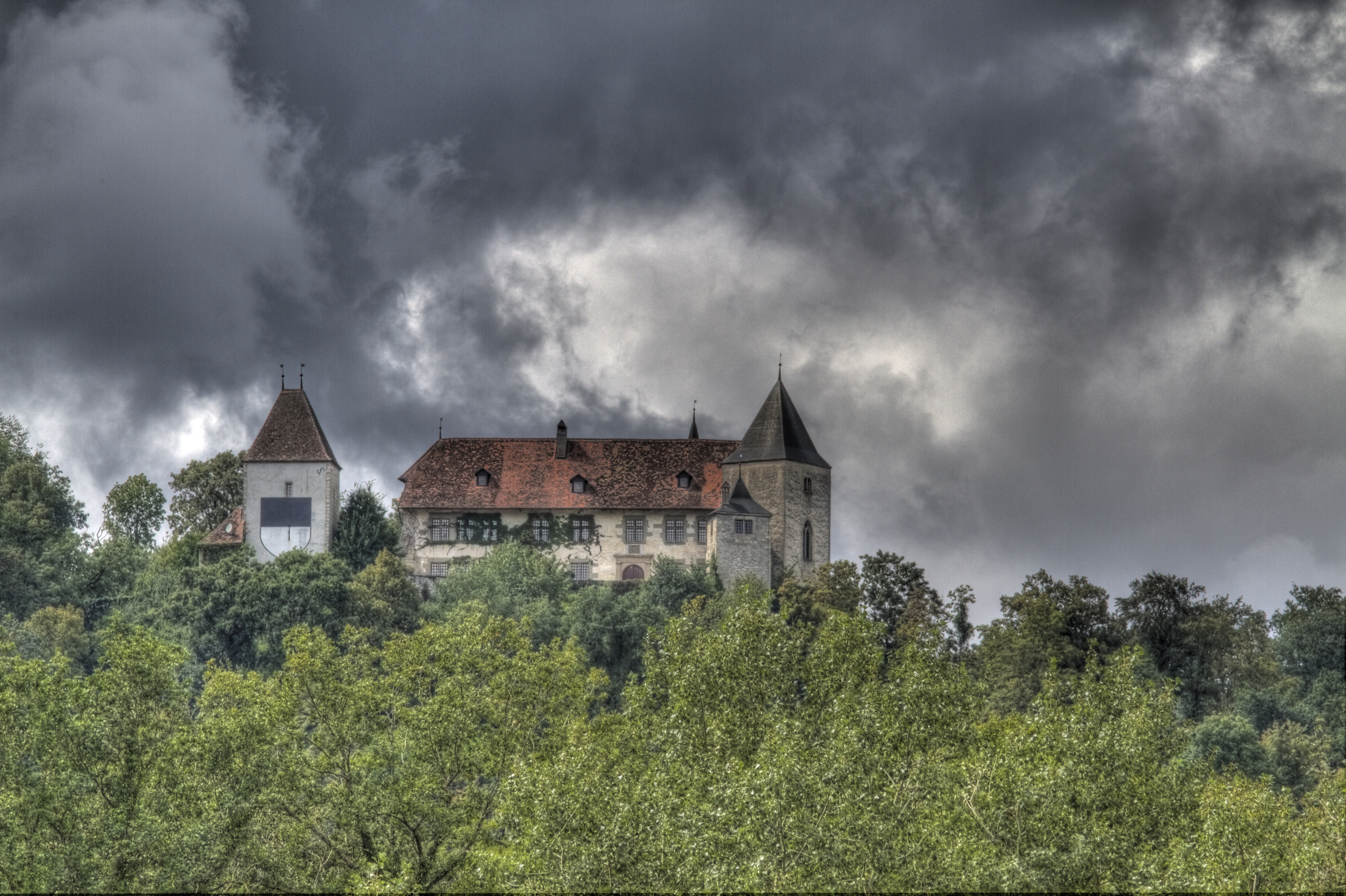 Le Château de Surpierre, vue de la Vallée de la Broye